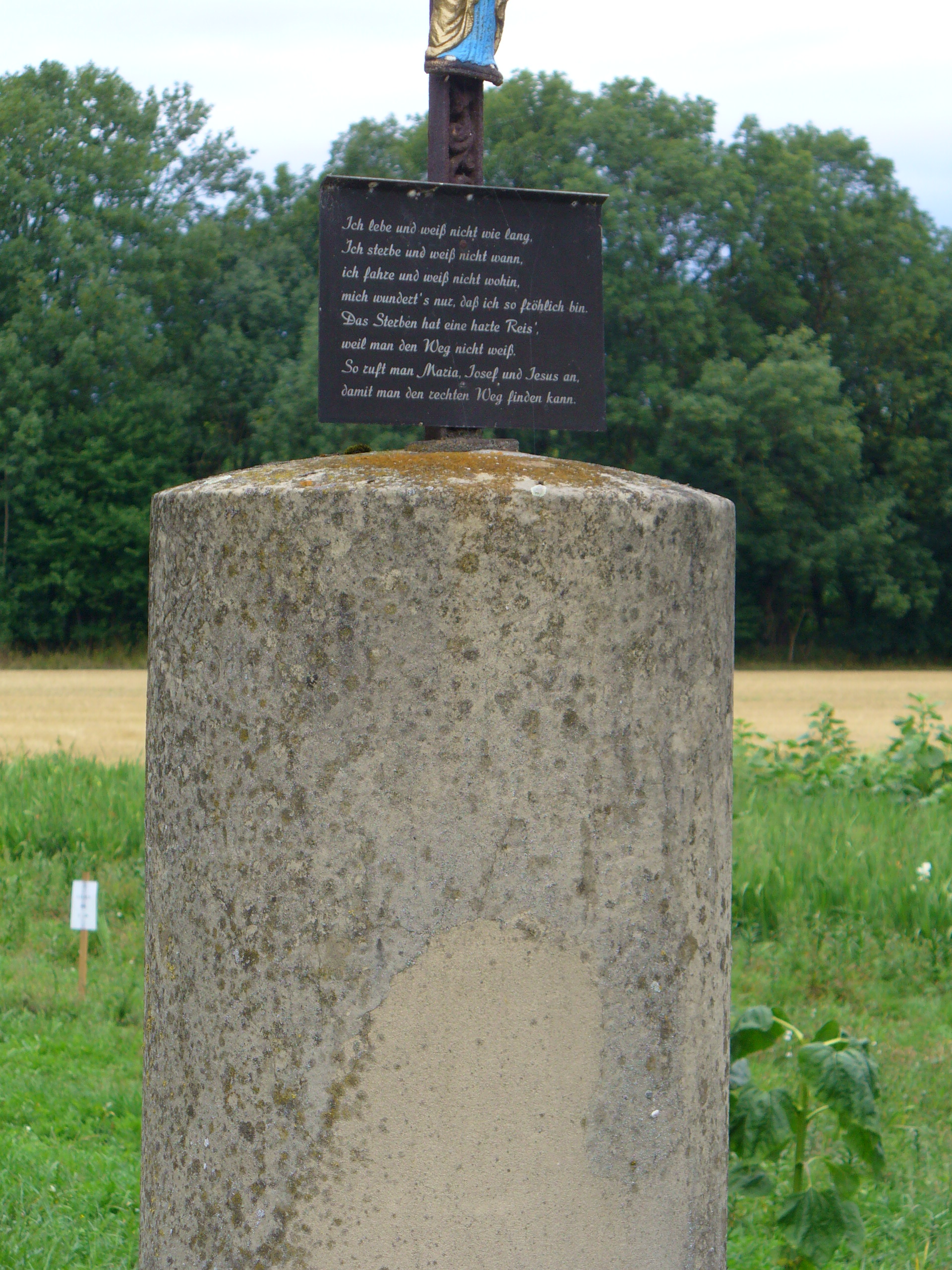 Schrifttafel an der Pestsäule zwischen München und Ismaning